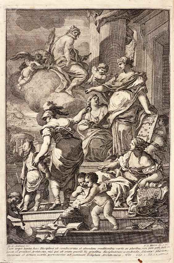 Vitrúvio (n. 70 a.C.) - L'architettura, traduzida e comentada por Berardo Galiani. Segunda edição. Publicada em Nápoles, Fratelli Terres, em 1790.